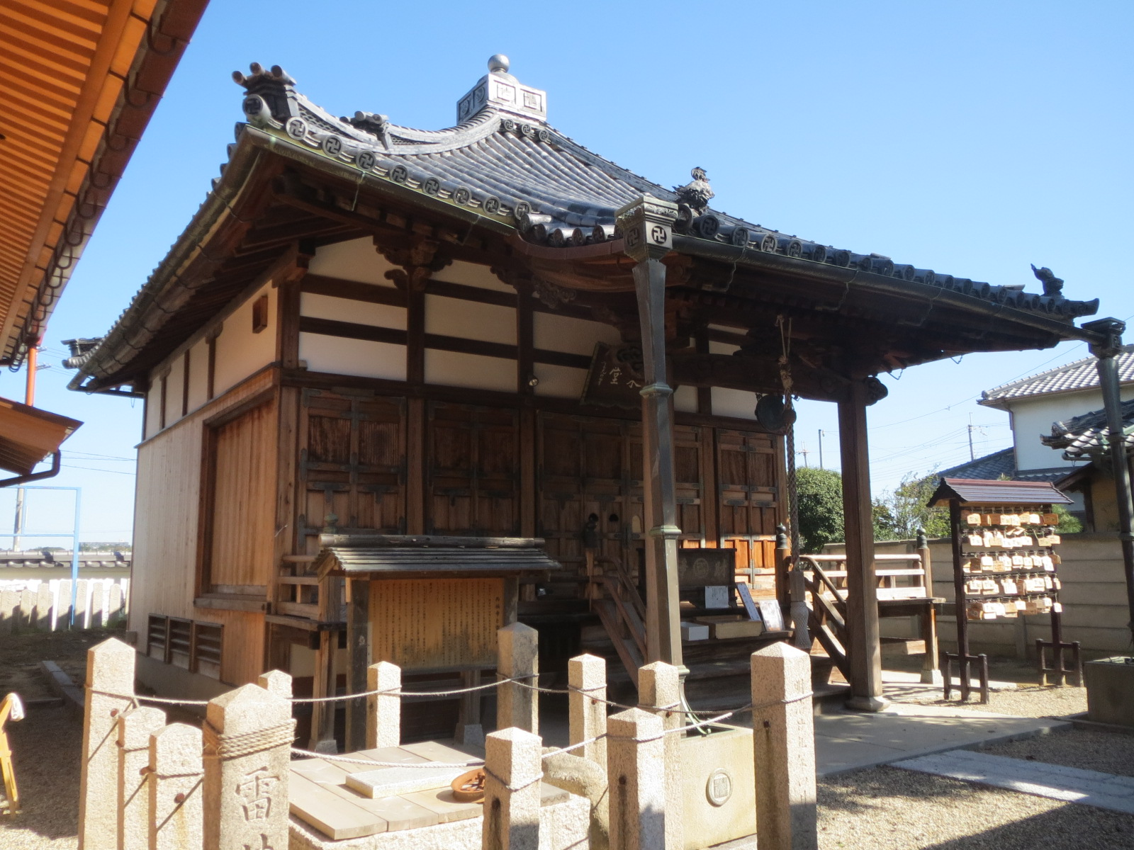 和泉市にある西福寺